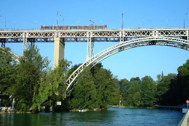 Siemens Combino Gelenktram auf der Kirchenfeldbrücke im Juli 2008.